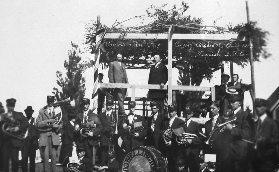 Souvenir de la 7e Convention nationale acadienne tenue à Tignish, Î.-P.-É., en août 1913.